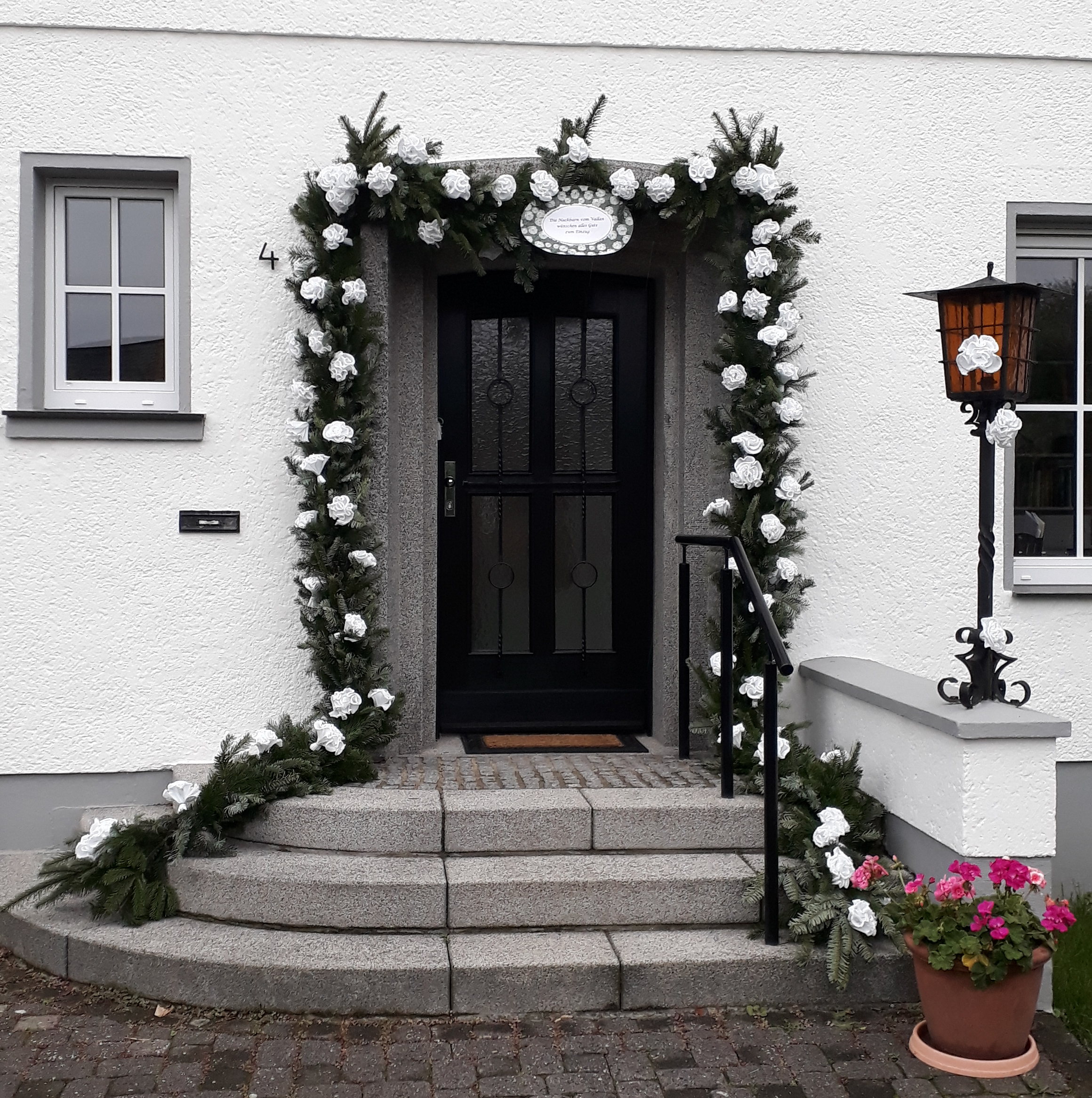 Kranz einer Pumpennachbarschaft zum Einzug.